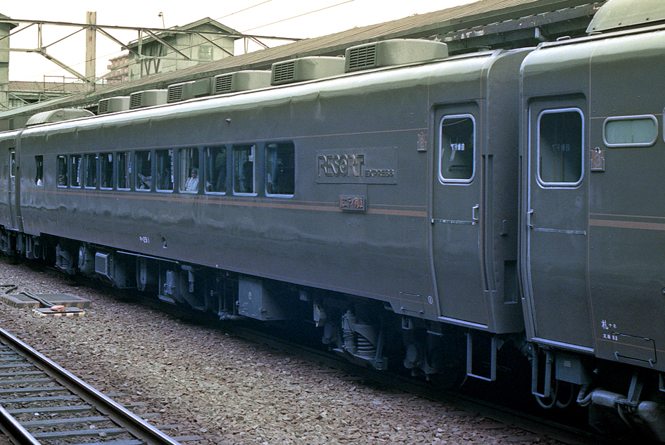 国鉄 キハ59系気動車「アルファコンチネンタルエクスプレス」 リゾートエクスプレス キハ29 1